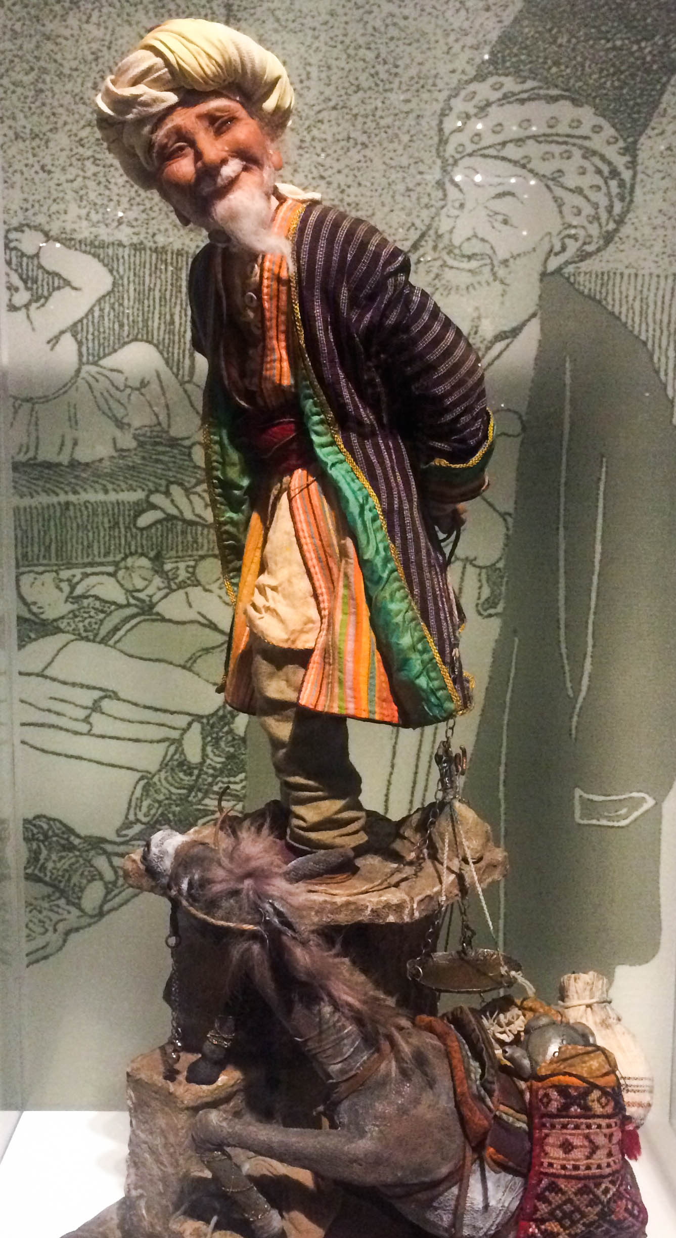 Molla Nəsrəddin fiquru, Elmira Abbaslı, tək nüsxəli əl işi. Heydər Əliyev Mərkəzinin kolleksiyası.